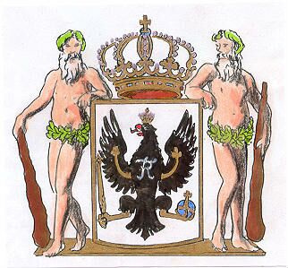 Small Court of Arms of Prussia/Kleines Wappen des Königreichs Preußen